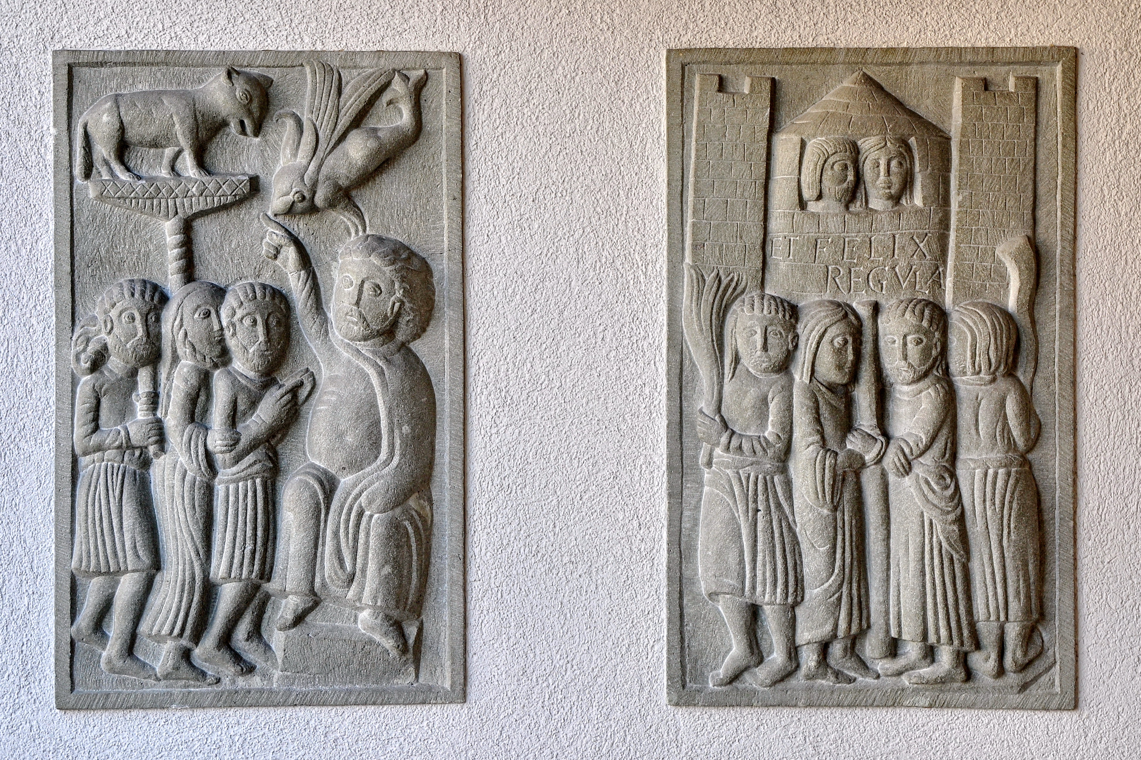 Katholische Kirche Felix und Regula in Zürich-Hard (Switzerland)